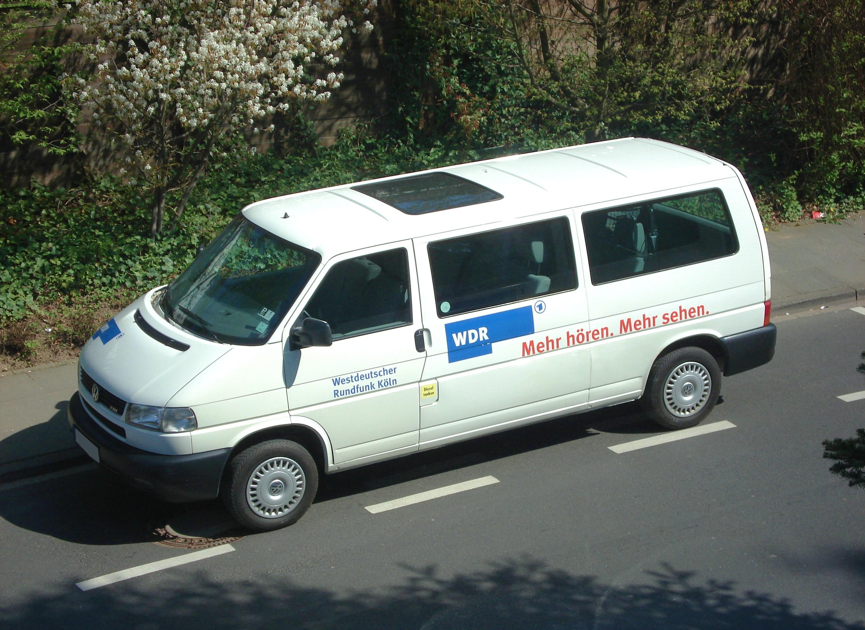 Ein WDR Auto.